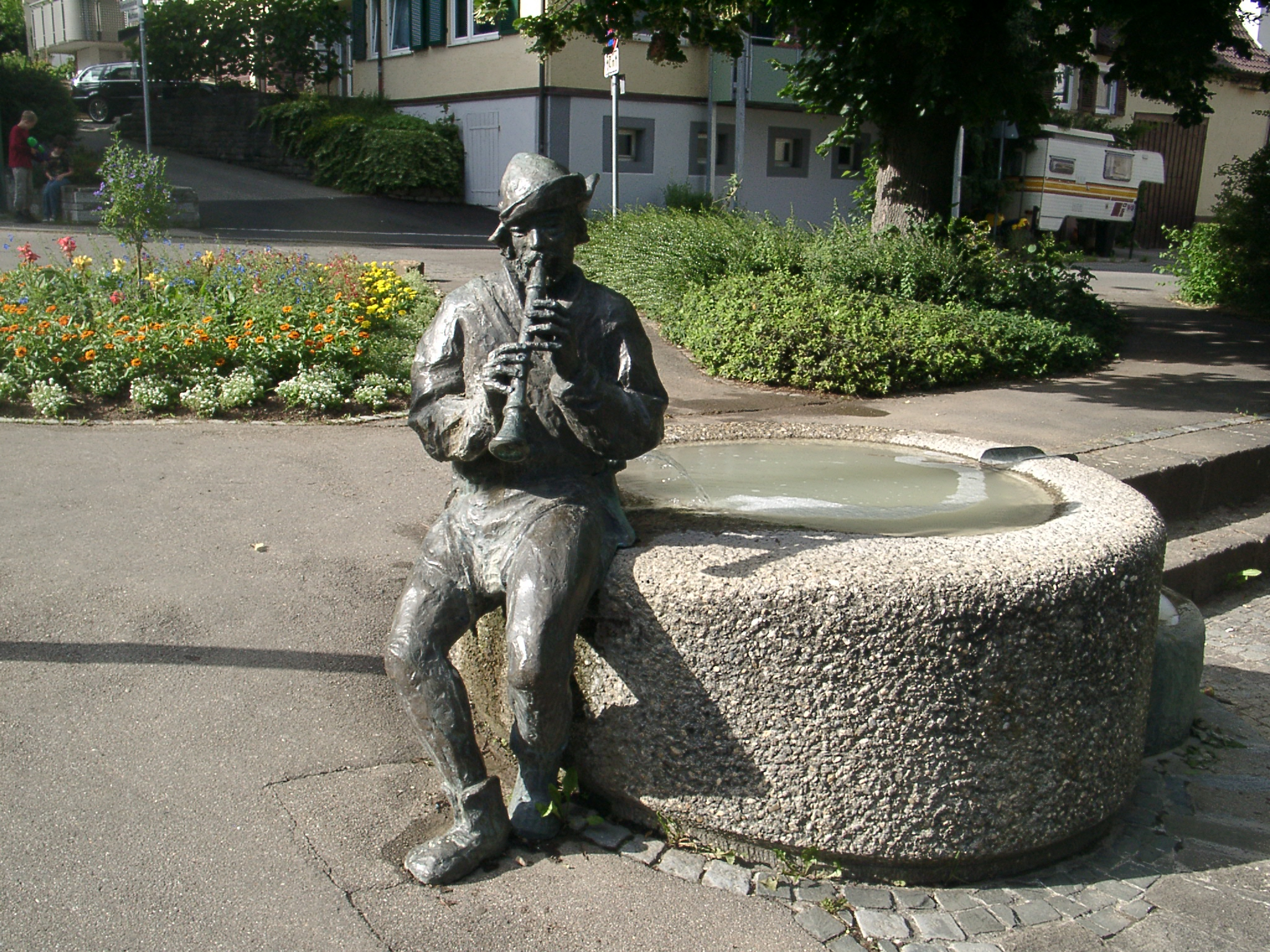 Brunnen "Pfeifer von Hardt"